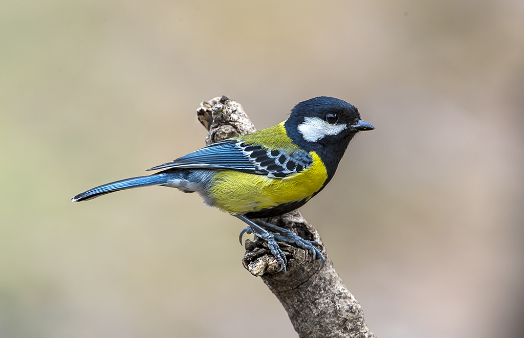 Sattal, Uttarakhand. April 2017